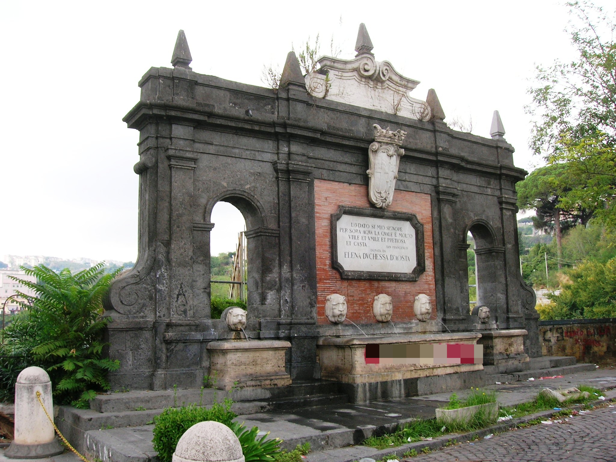 Fontana della Regiona Elena